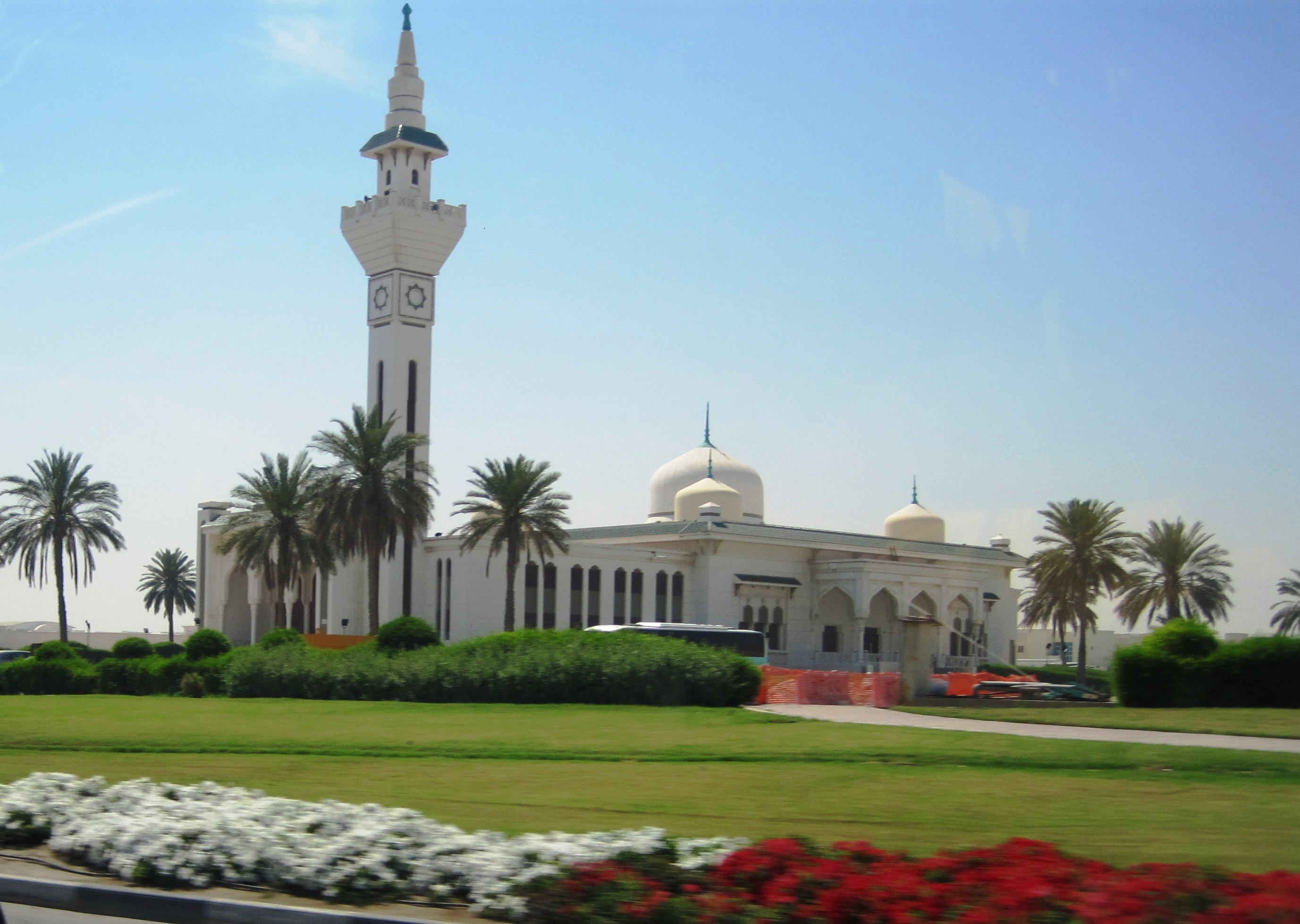 അൽവക്ര മസ്ജിദ്